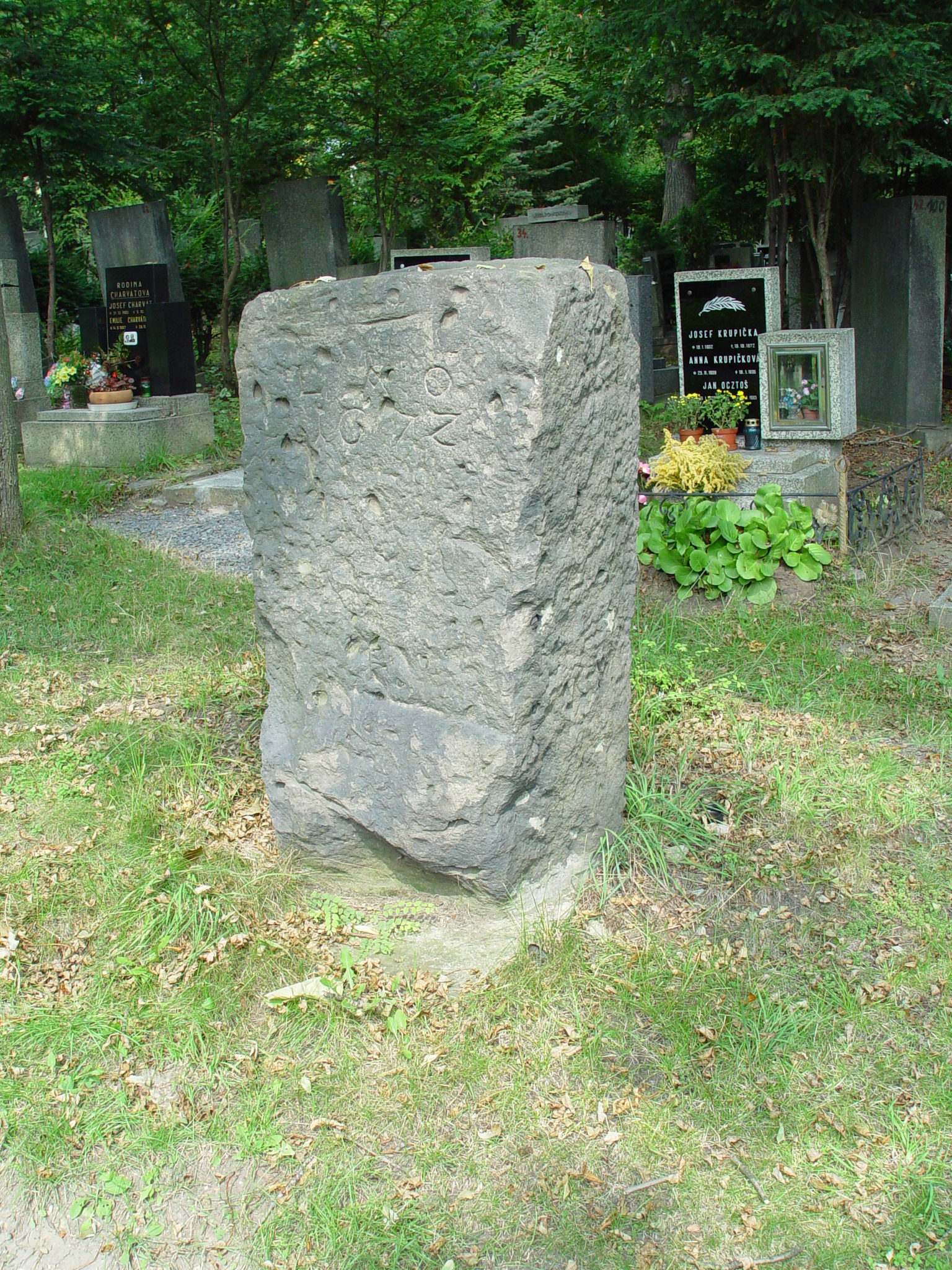 Smírčí kámen z Libkovic přenesený ze zrušené obce na starý hřbitov v Mostě